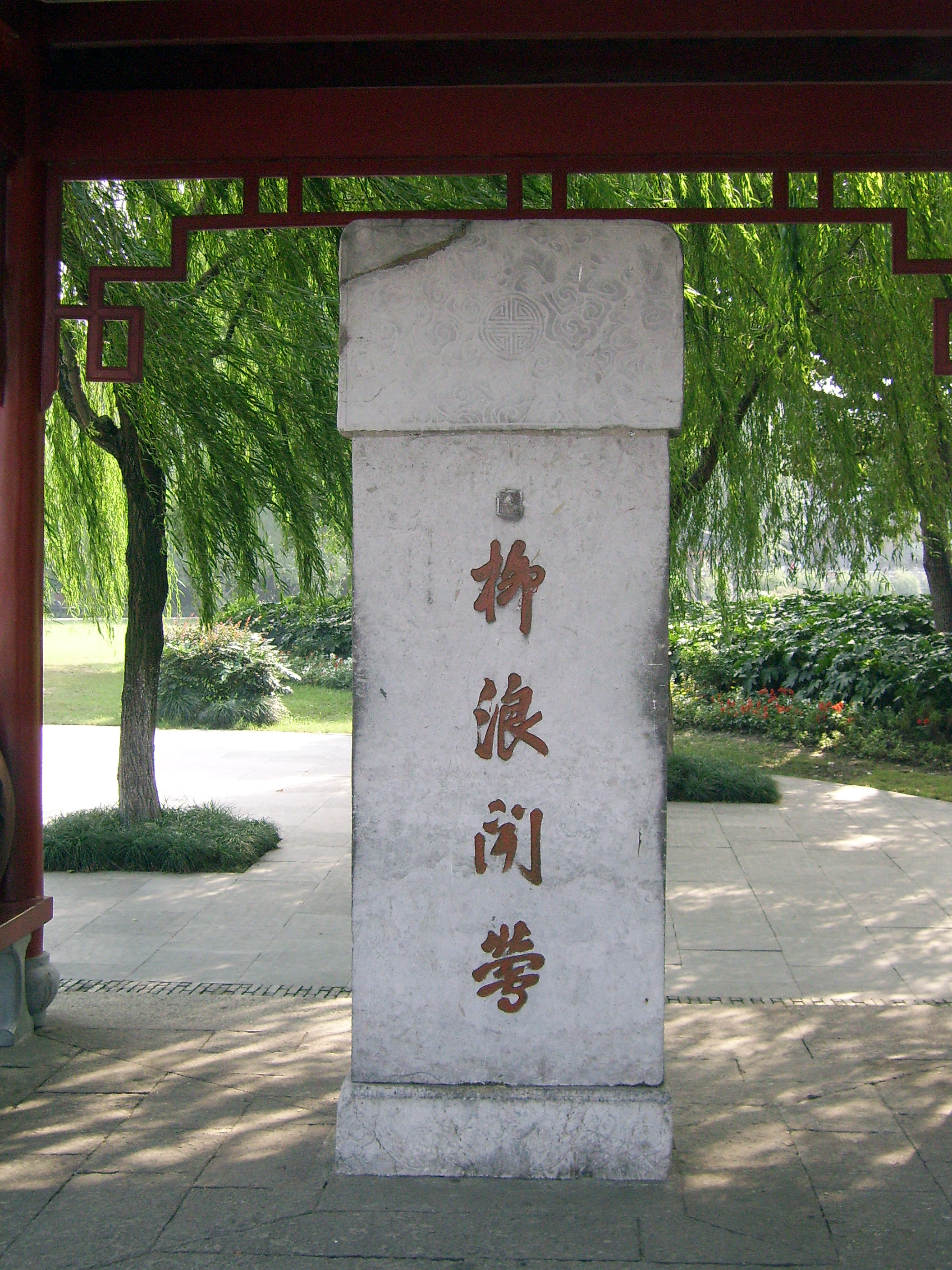 杭州西湖柳浪闻莺石碑